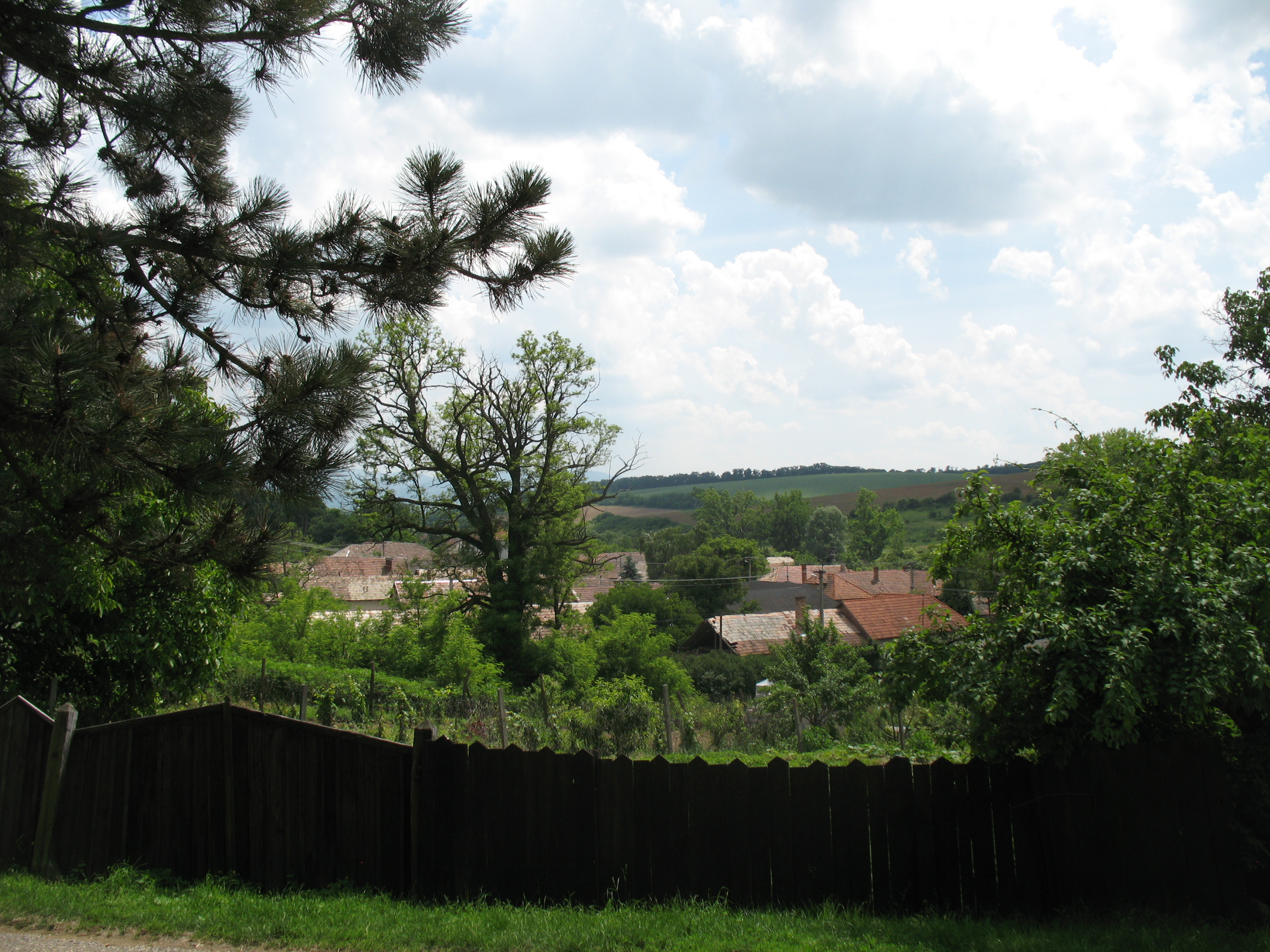 Alsószemeréd